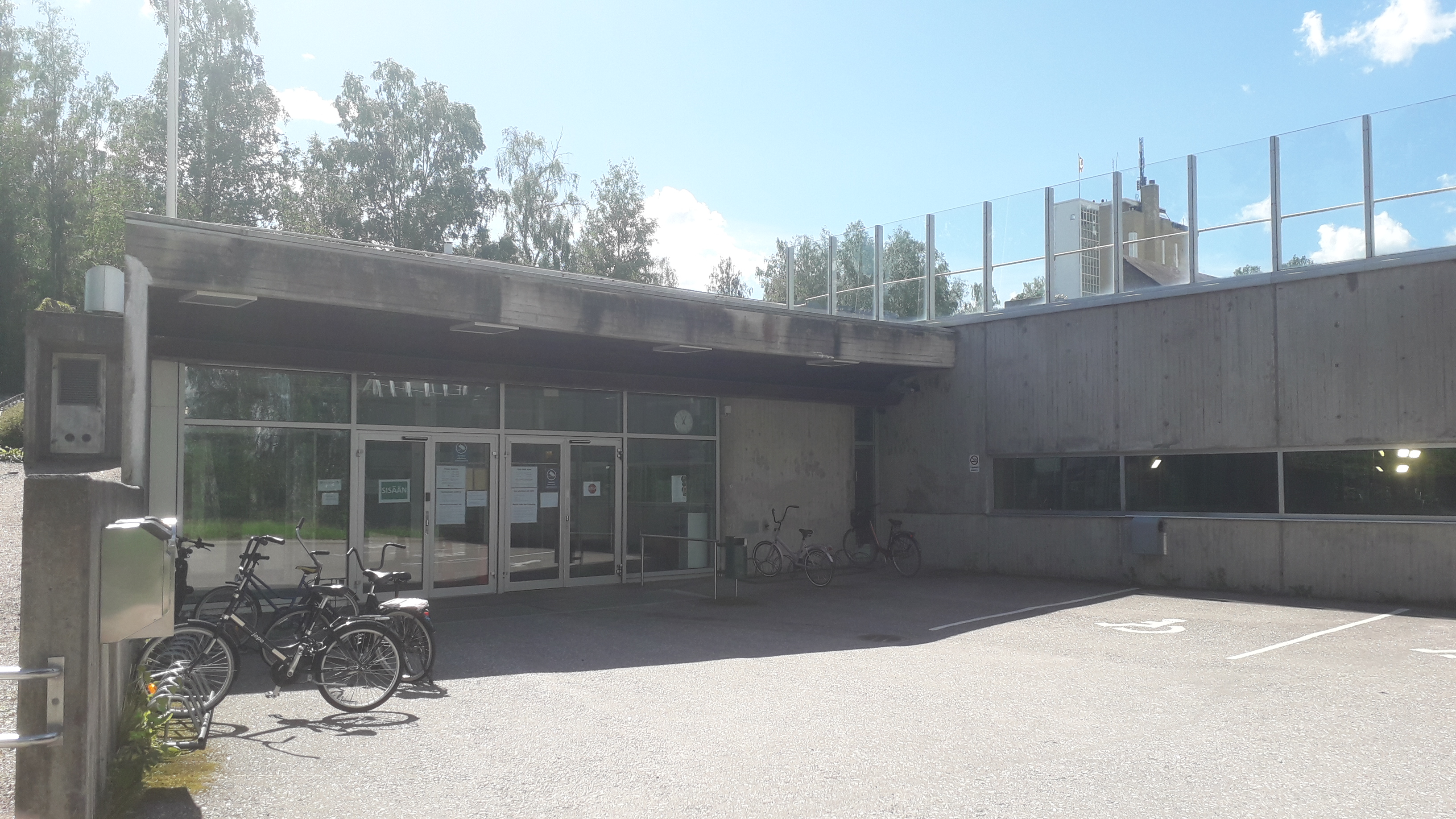 Riihimäen uimahallin sisäänkäynti heinäkuussa 2020.